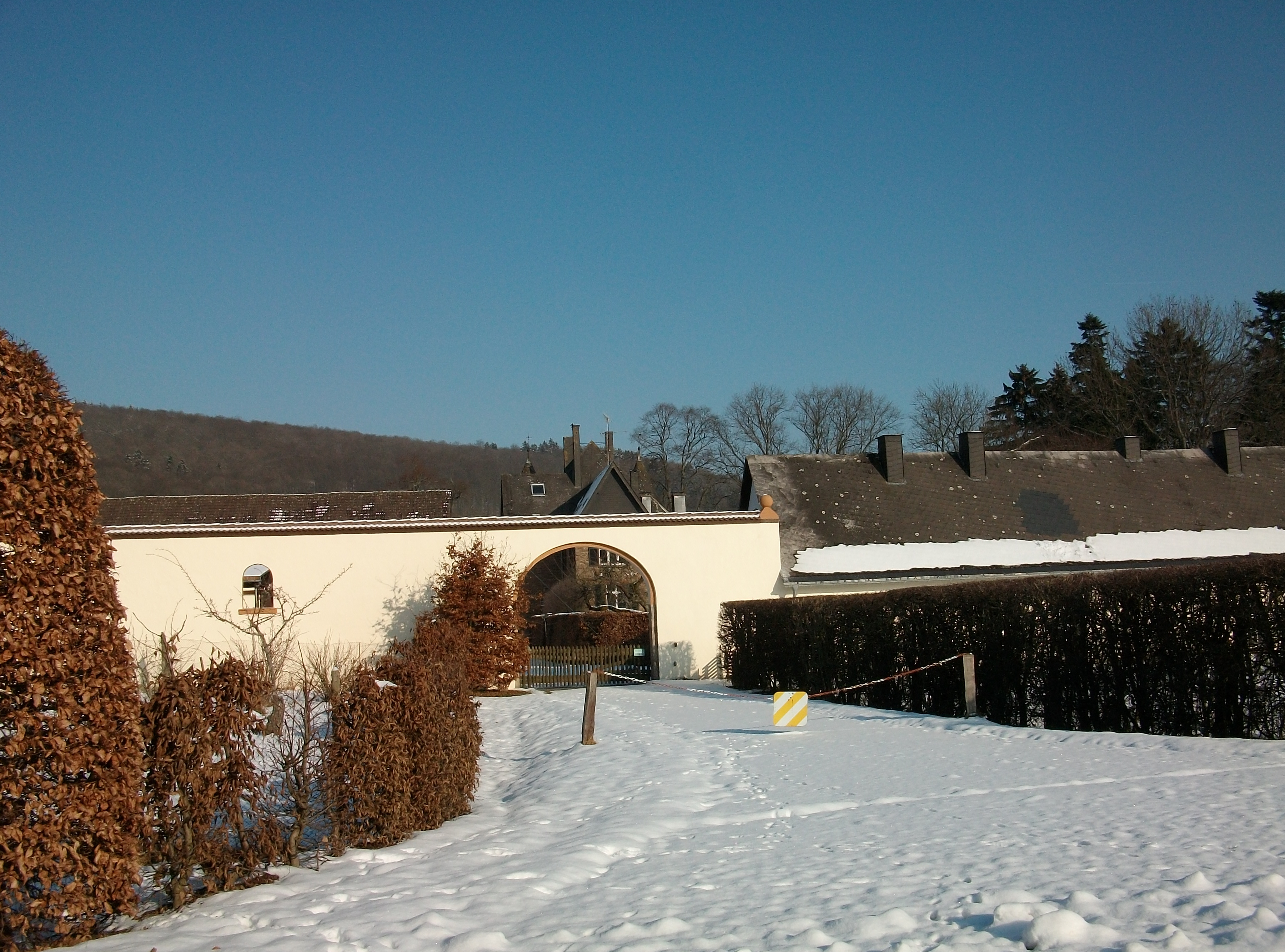 Kloster Glindfeld, Medebach (Germany)